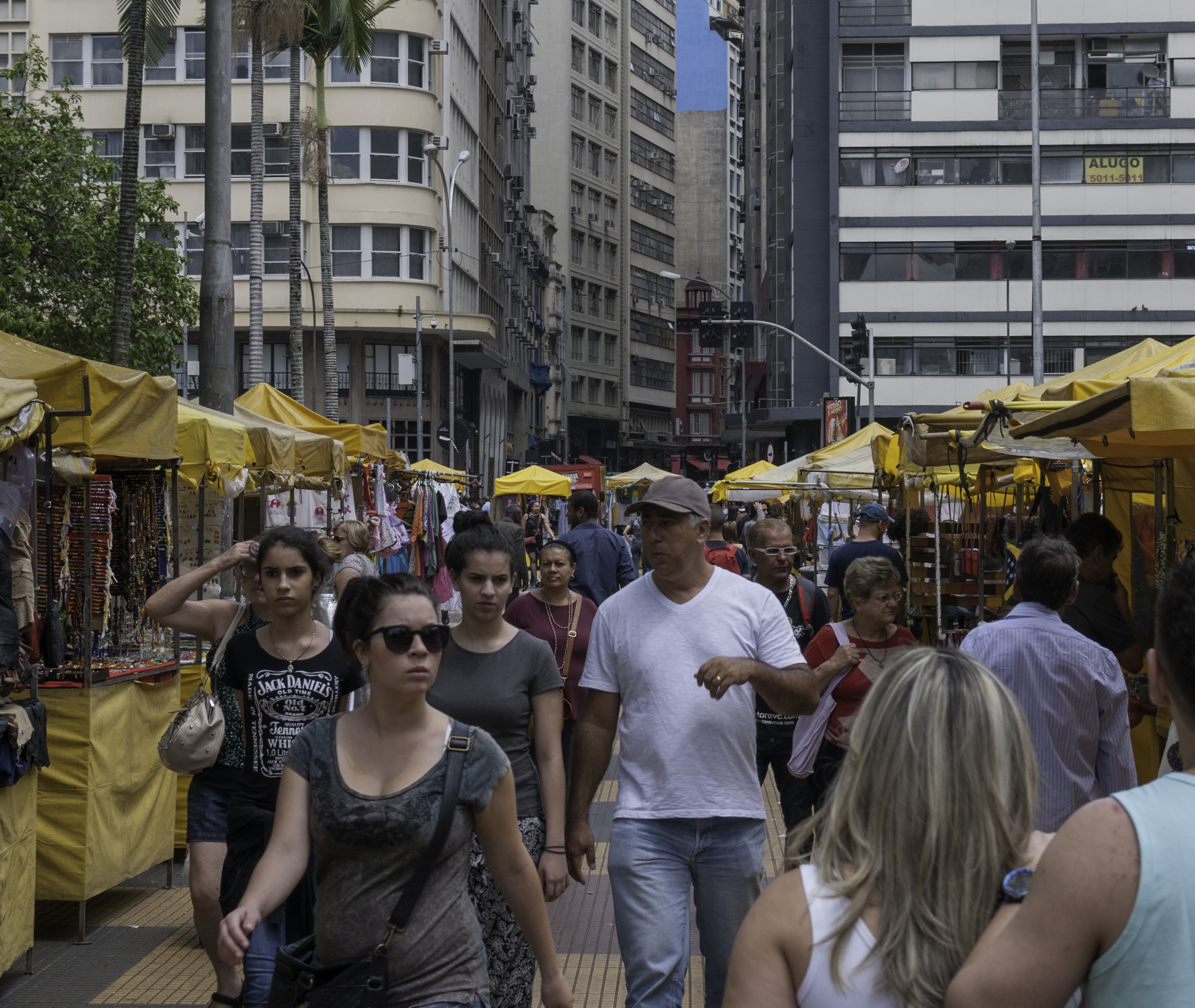 Mercado Artesanal de São Paulo